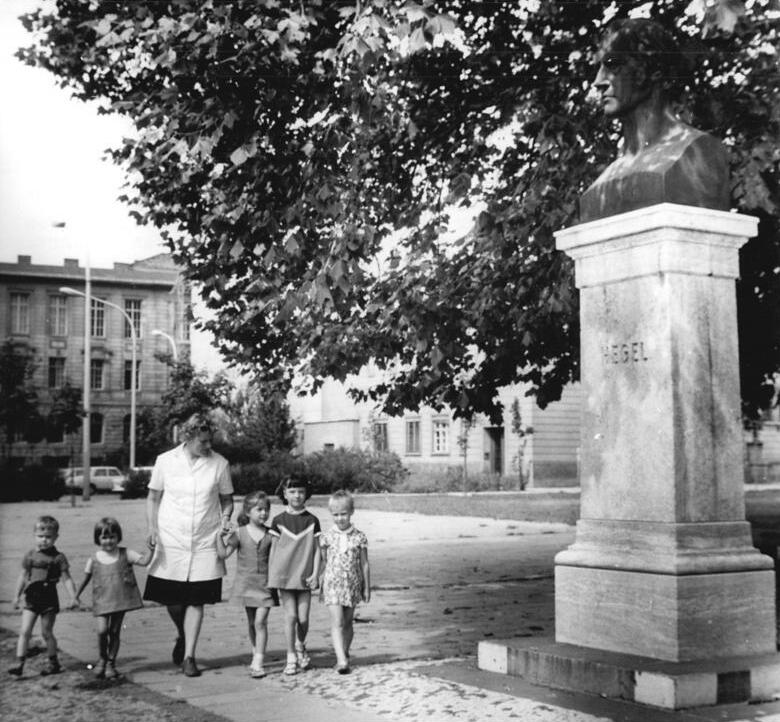 Zentralbild-Sturm -11. 8. 1970 Zum 200. Geburtstag Georg Wilhelm Friedrich Hegels. Der Philosoph Georg Wilhelm Friedrich Hegel wurde am 27. August 1770 in Stuttgart geboren. Ab 1813 wirkte er als Professor für Philosophie an der Universität Berlin, der heutigen Humboldt-Universität zu Berlin in der DDR-Hauptstadt. Im Jahre 1829 wurde er zum Rektor dieser Alma mater berufen. Die Cholera-Epidemie von 1831 raffte diesen großen Gelehrten am 14. November 1831 dahin. In der Hauptstadt der DDR zeugen viele Stätten vom Wirken des Wissenschaftlers. Unser Foto zeigt das Denkmal des Philosophen, das auf dem Hegelplatz hinter der Humboldt-Universität seinen Platz hatAnläßlich seines 200. Geburtstages sind zahlreiche Veranstaltungen vorgesehen. Noch in diesem Monat wird vom 23. -29. 8. 70 ein Internationaler Hegel-Kongreß von der Internationalen Hegel-Gesellschaft, der Deutschen Akademie der Wissenschaften zu Berlin und der Humboldt-Universität zu Berlin in der Hauptstadt durchgeführt. Hieran werden etwa 250 Wissenschaftler aus 25 Ländern Europas, Asiens und Amerikas teilnehmen.